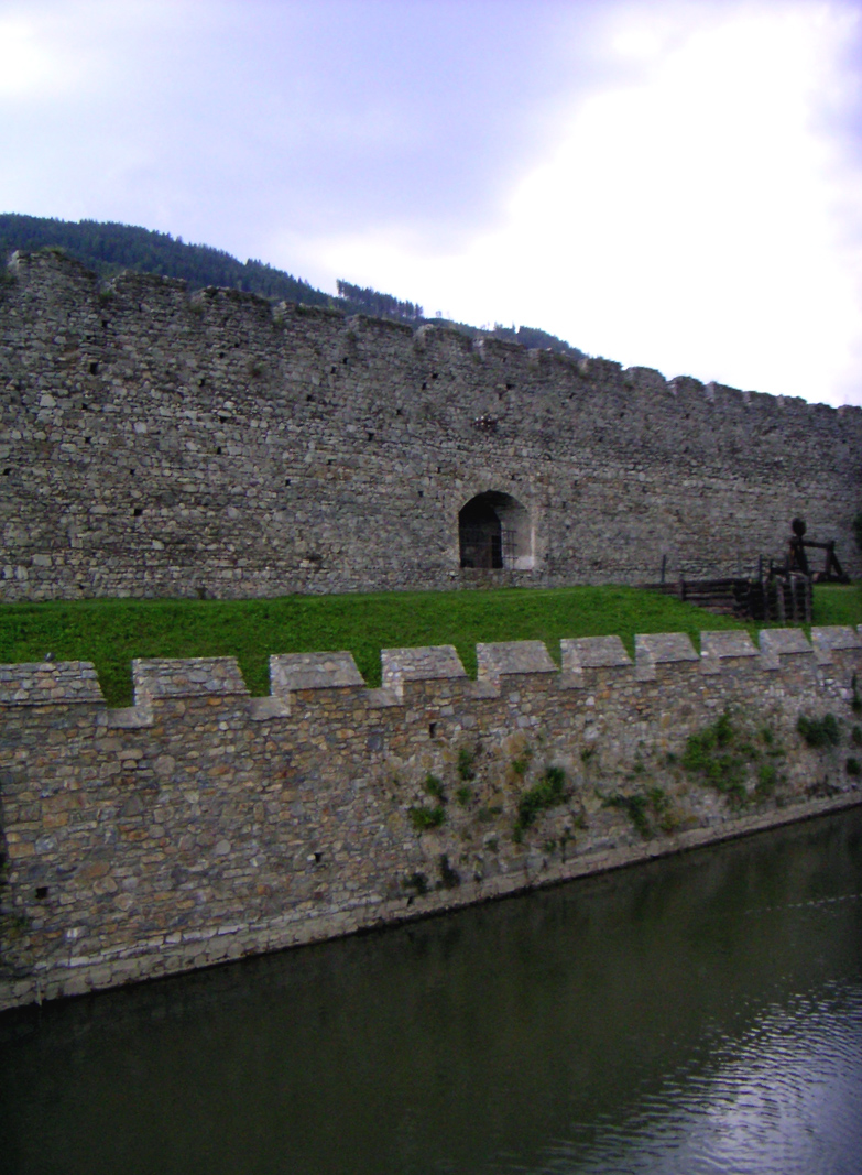 Wasserführender Stadtgraben mit Zinnenringmauer in Friesach (Kärnten)